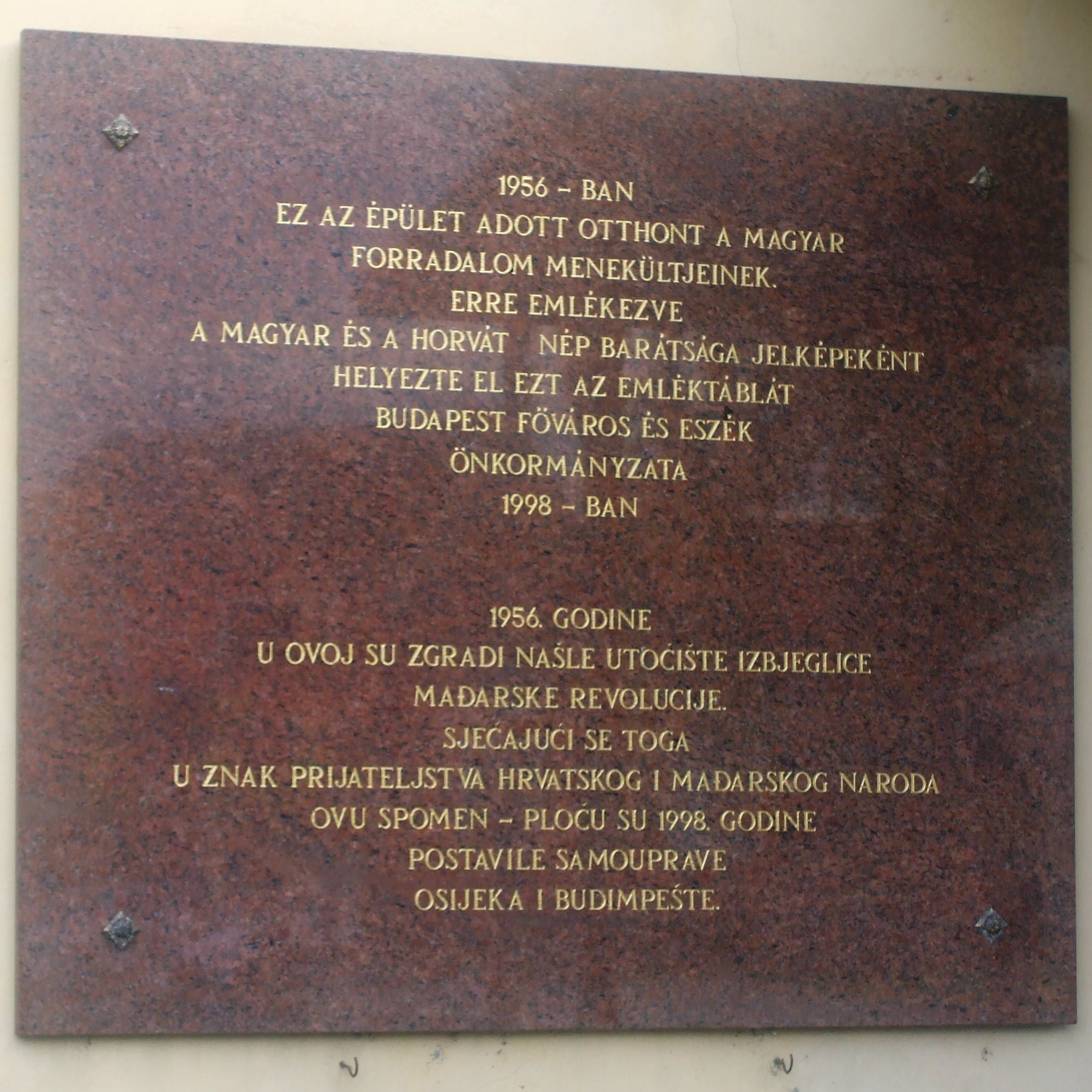 Spomen ploča na dvorcu Mačkamama u Osijeku